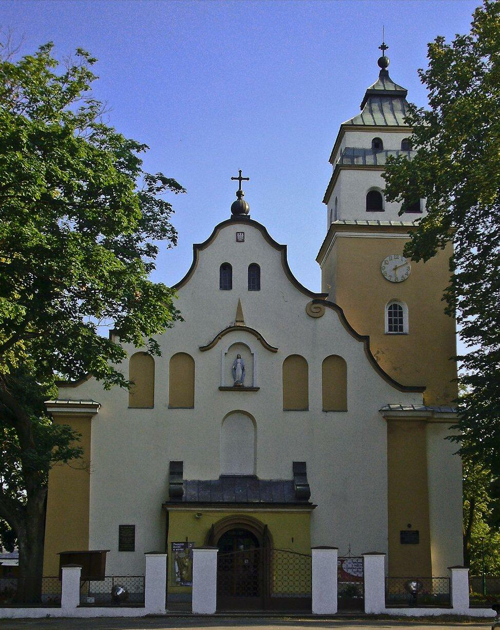 Kościół parafialny, pochodzący z lat 20. ubiegłego wieku. Widok od frontu.